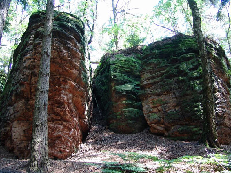 Bodensteiner Klippen bei Bockenem. Ein wunderschönes Naturdenkmal !